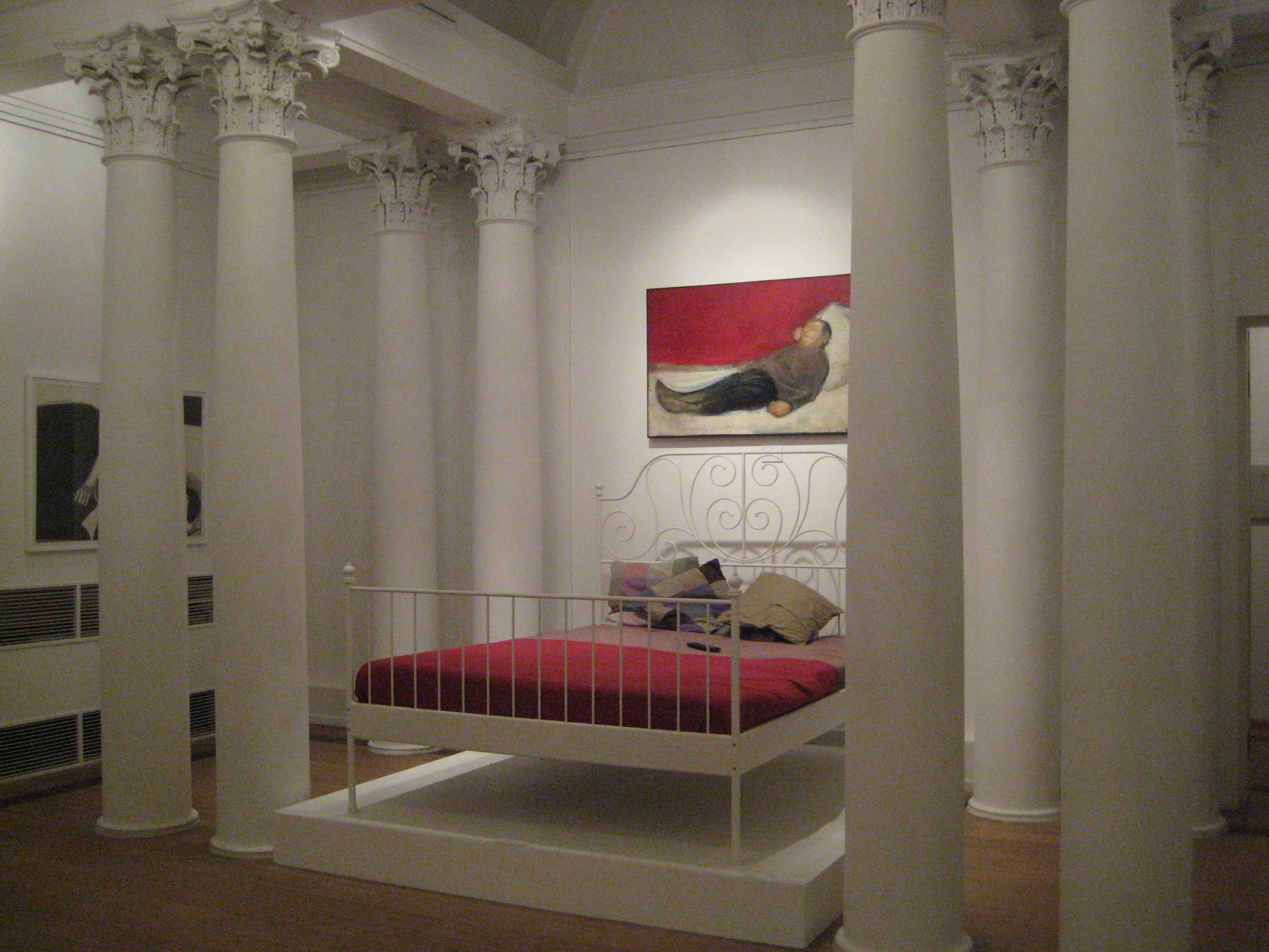 ММСИ